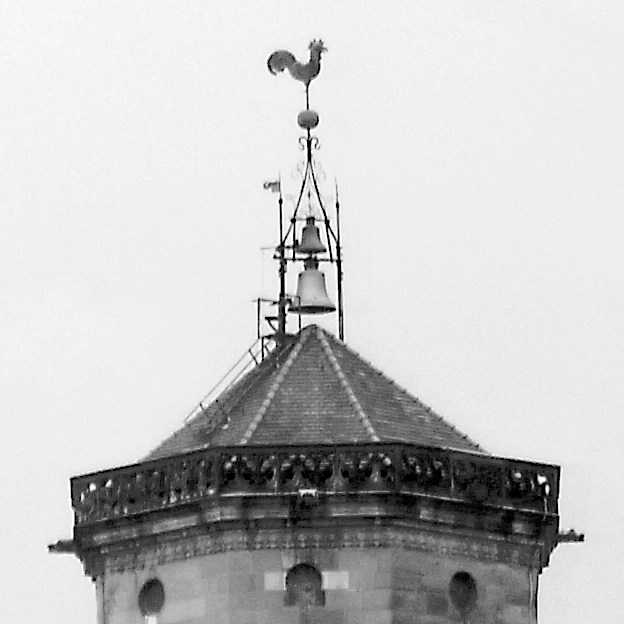 Westturmspitze der Stiftskirche Stuttgart, Dachreiter mit Glocken und Wetterhahn